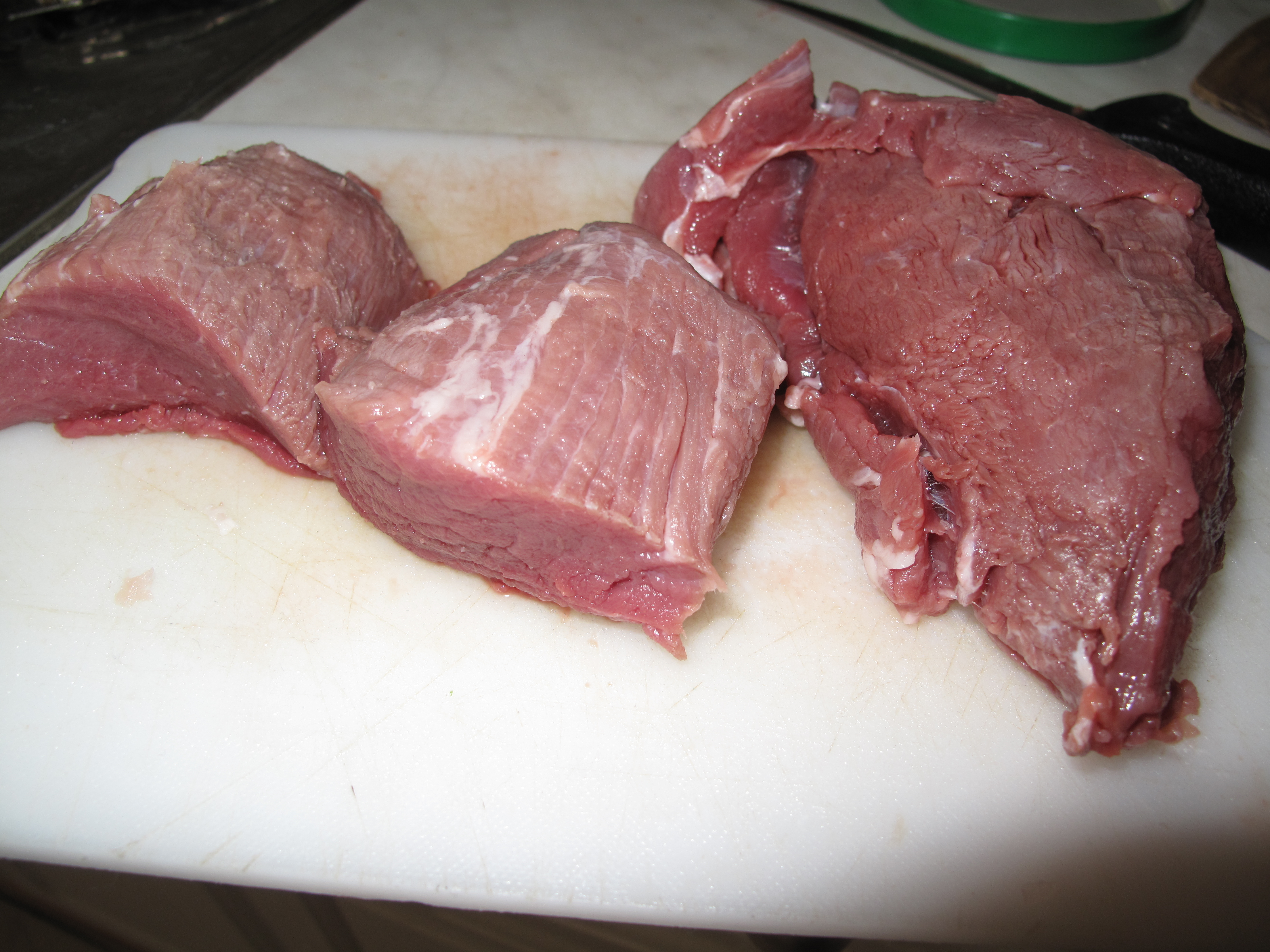 Vepřové a kančí maso